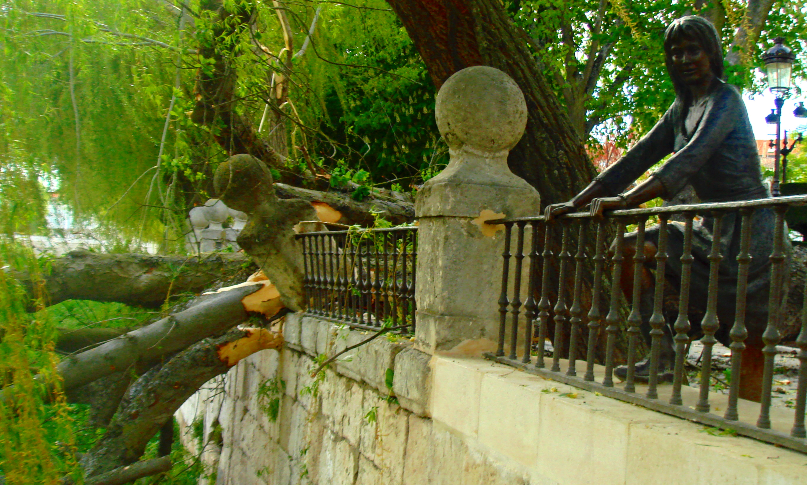 Estatua y castaño abatido por el temporal, Paseo del espolón, muro río Arlanzón, Burgos, España